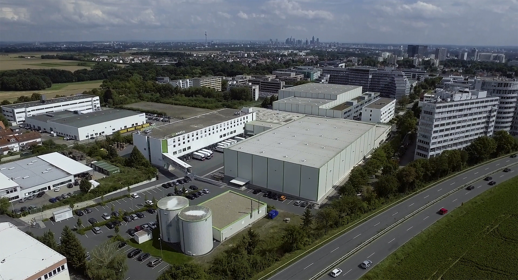 UNI ELEKTRO Firmensitz Eschborn